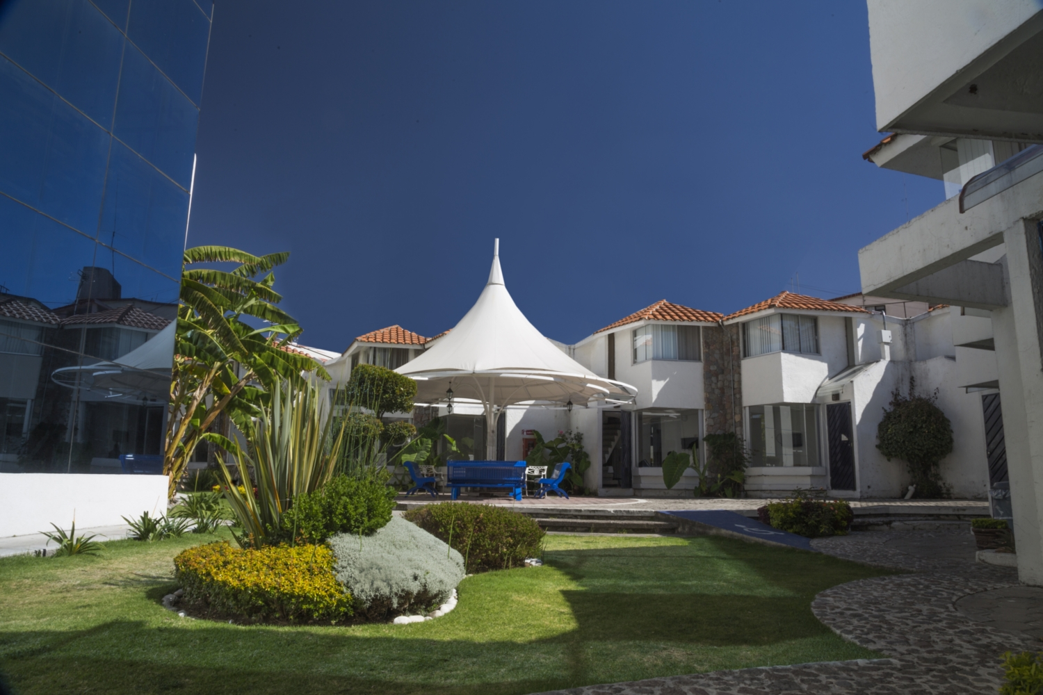 Residencias para alumnos foráneos